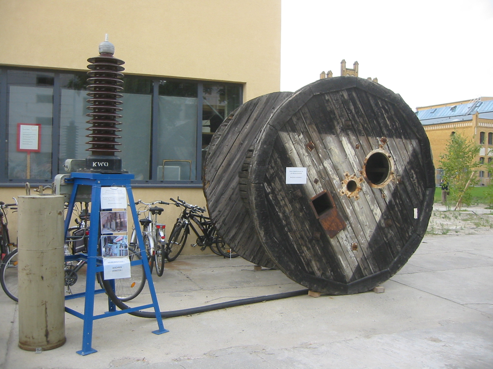 Transporttrommel mit Ölbehälter für Ölkabel vor dem Industriesalon Schöneweide in Berlin-Oberschöneweide